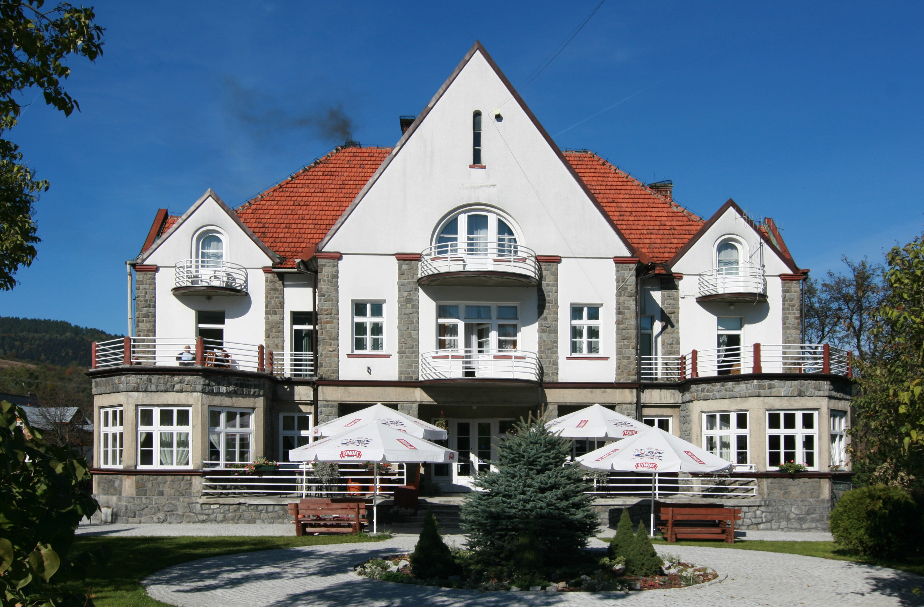 Willa "Granit" przy ul. Jagiellońskiej 70 w Krościenku nad Dunajcem